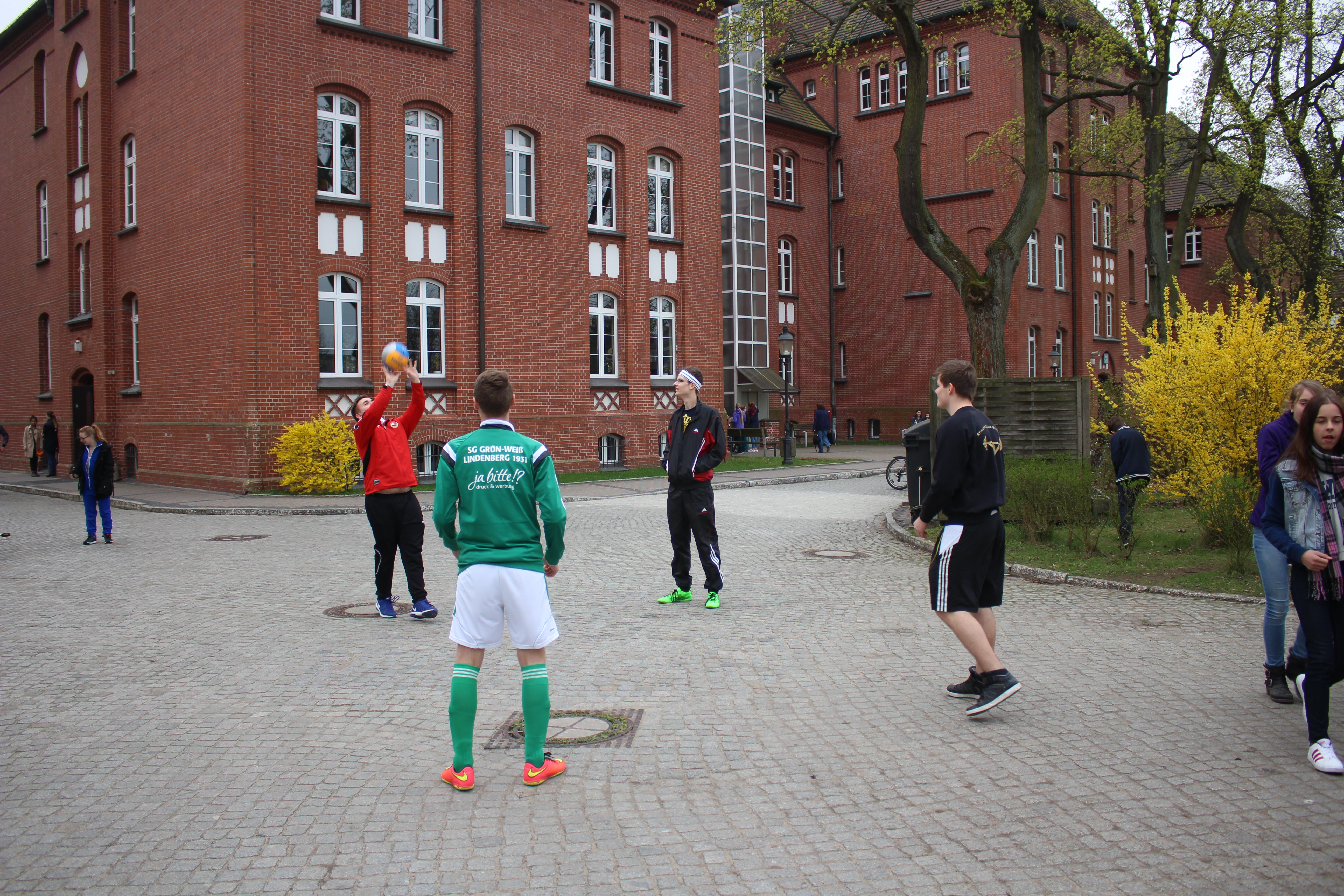 Abgebildet ist die Rückseite des Hauptgebäudes (im Hintergrund). Im Vordergrund 4 Abiturienten am Mottotag "Sport".